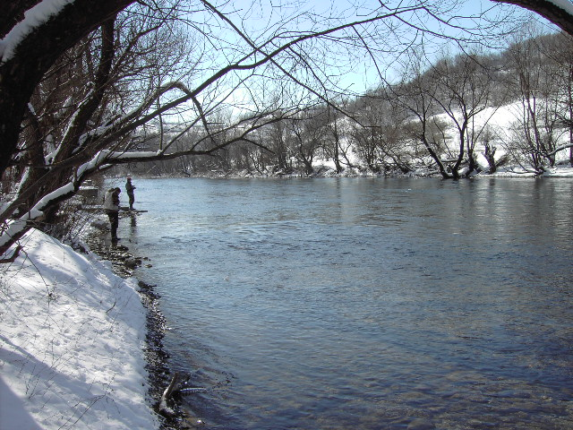 Fluss Sana bei Podovi